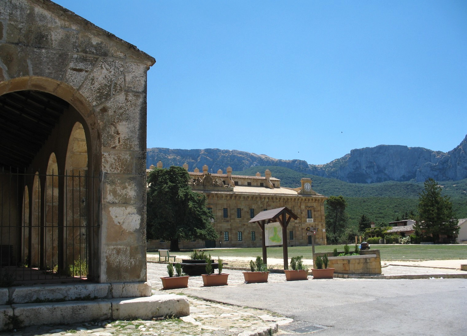 Ficuzza